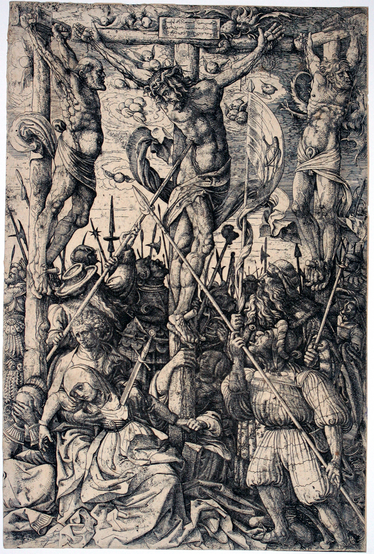 Hopfer, Daniel (vers 1470-1536): Christus am Kreuze. Eisenradierung. 33,3 x 21,7 cm. B. 14, Hollstein 19 I (von III). Prachtvoller, gegensatzreicher und toniger Druck, bis auf die Plattenkante beschnitten, unten geringfügig knapp. Vor der Nummer von Funck. Die Ränder verso beklebt, geringfügige Erhaltungsmängel, der Gesamteindruck jedoch sehr schön.